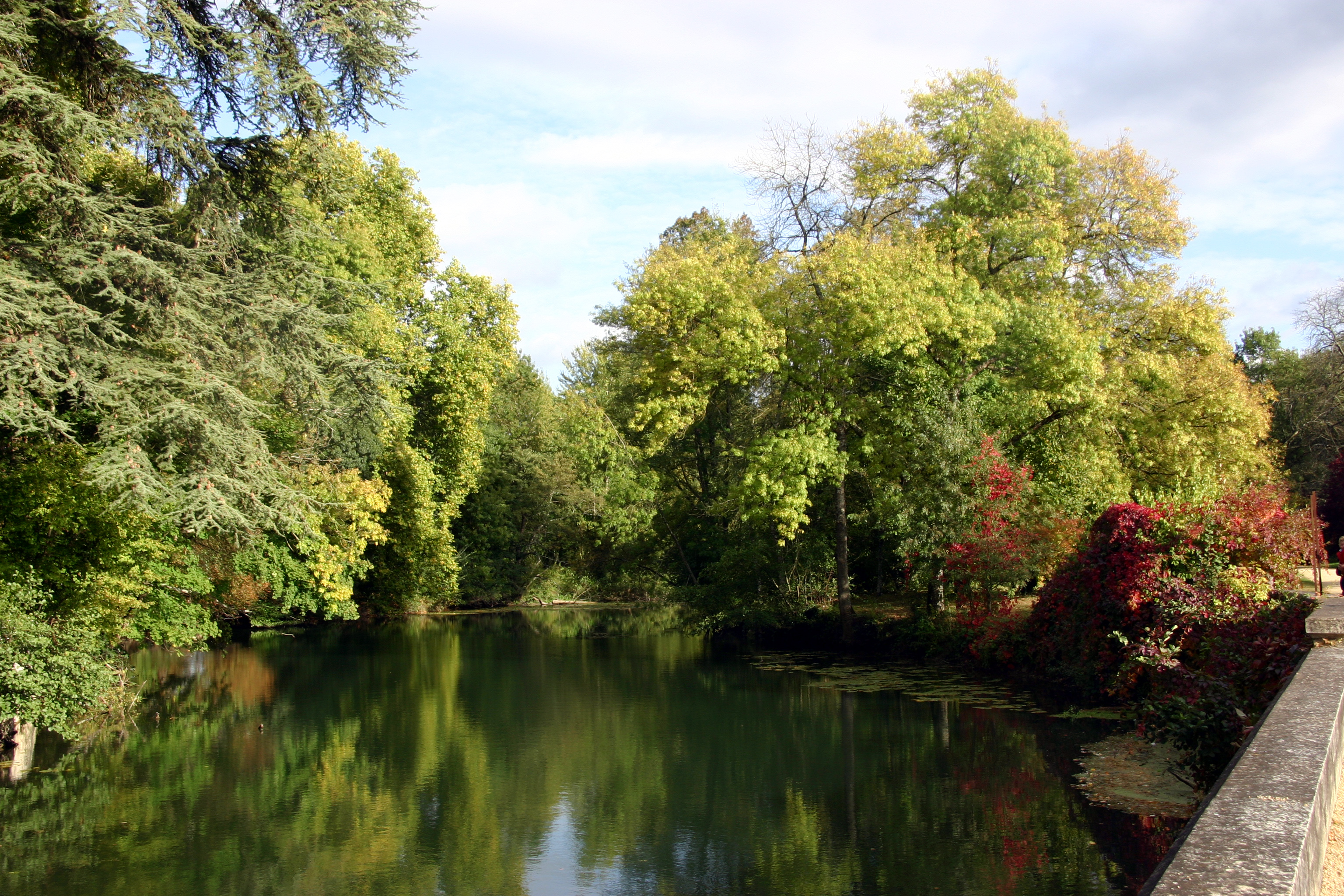 Schloss in Azay-le-Rideau